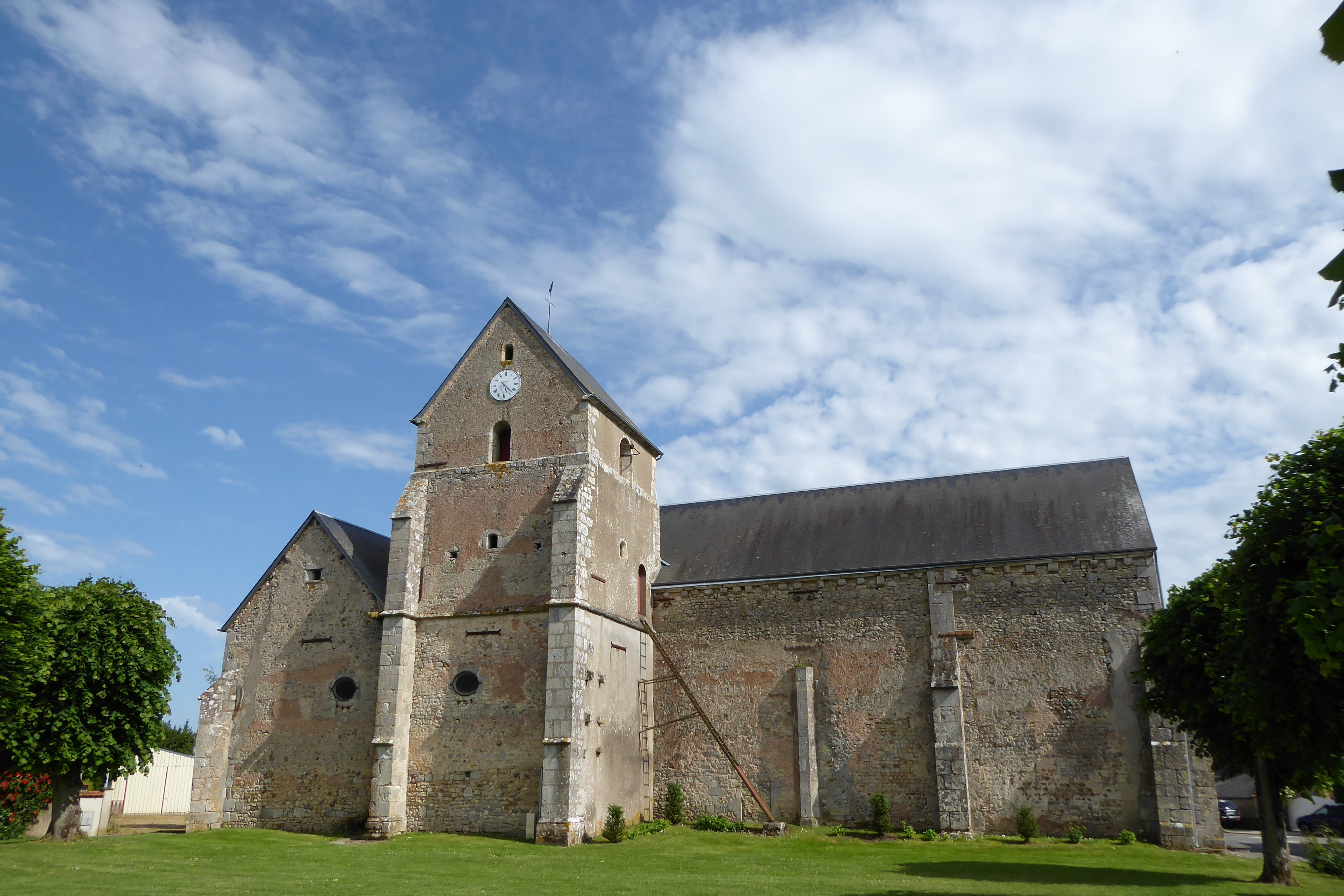 église Saint-Hilaire, Montainville, Eure-et-Loir, France.